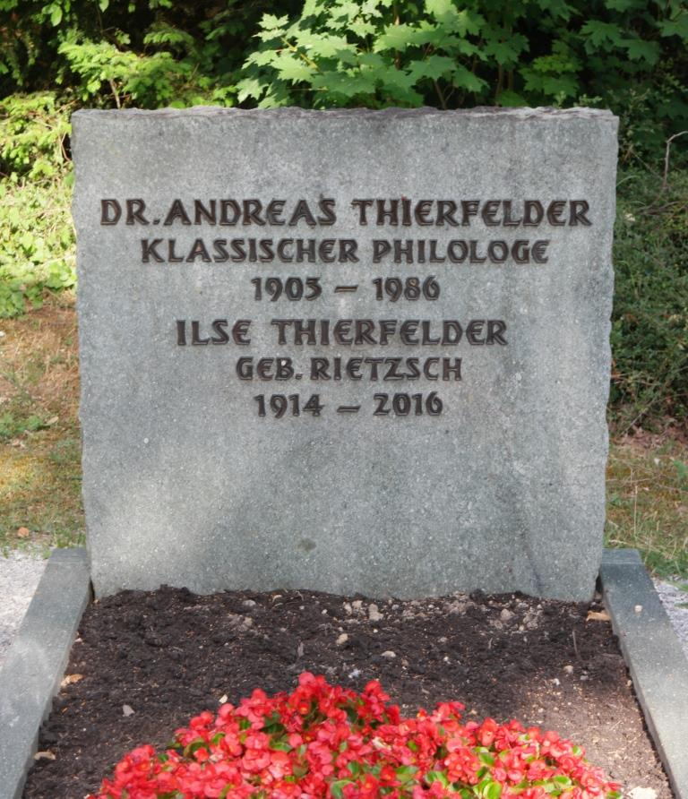 Grab des Philologen Andreas Thierfelder, 1903-1986, auf dem Hauptfriedhof Mainz